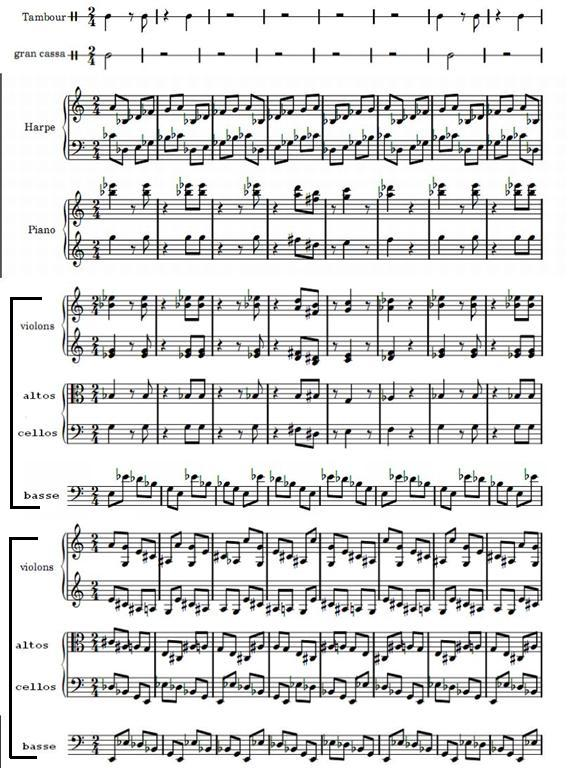 extrait de la musique pour cordes, percussion et celesta de bela bartok